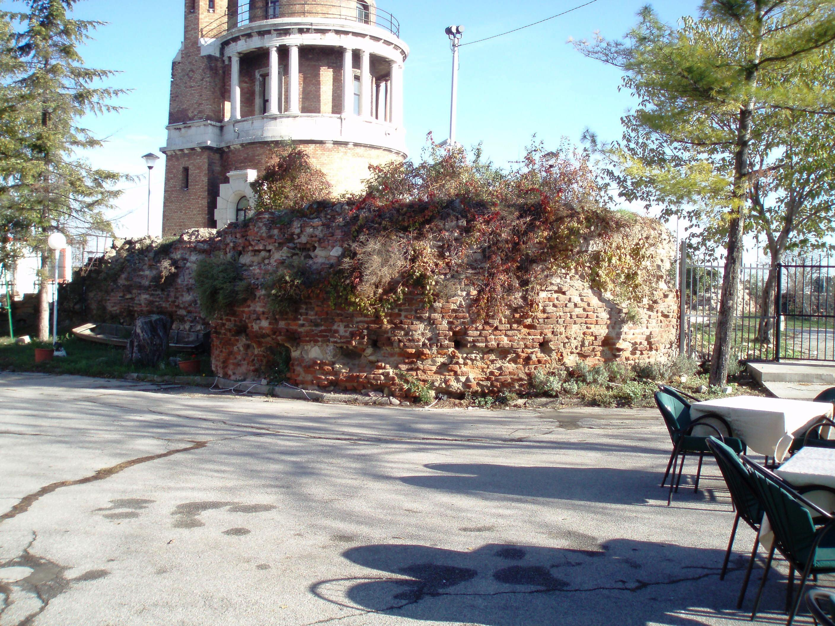 Izgled ostataka južne okrugle kule gardoške citadele, autor fotografije:Nicolo